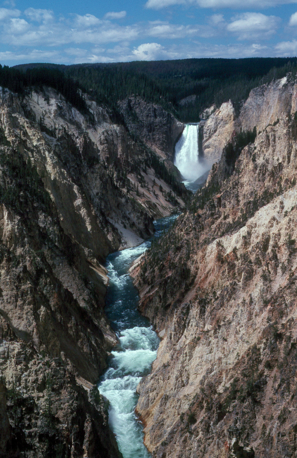 Yellowstone-River mit den Lower Falls im Yellowstone-Nationalpark (USA).